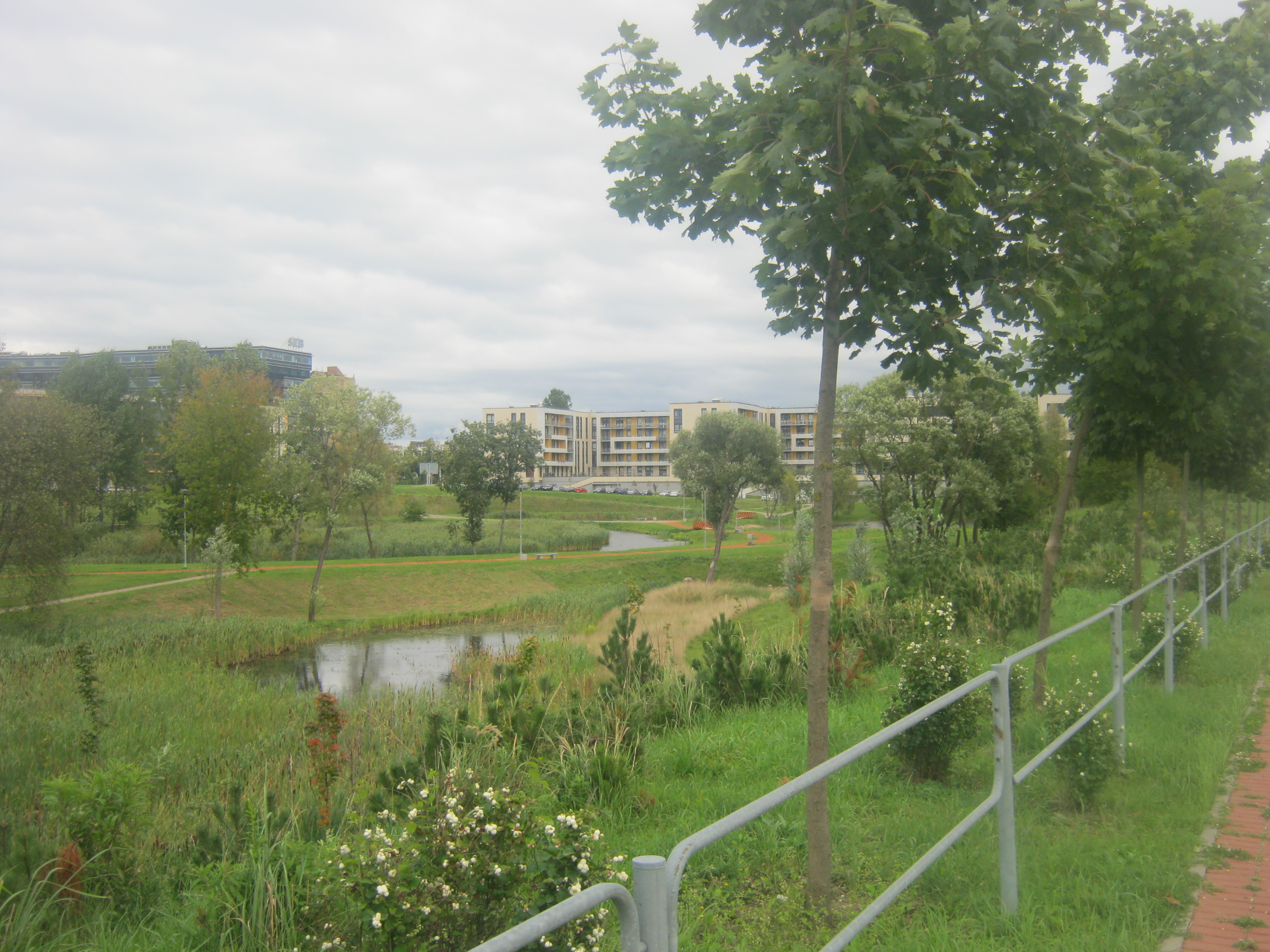 Vilnius